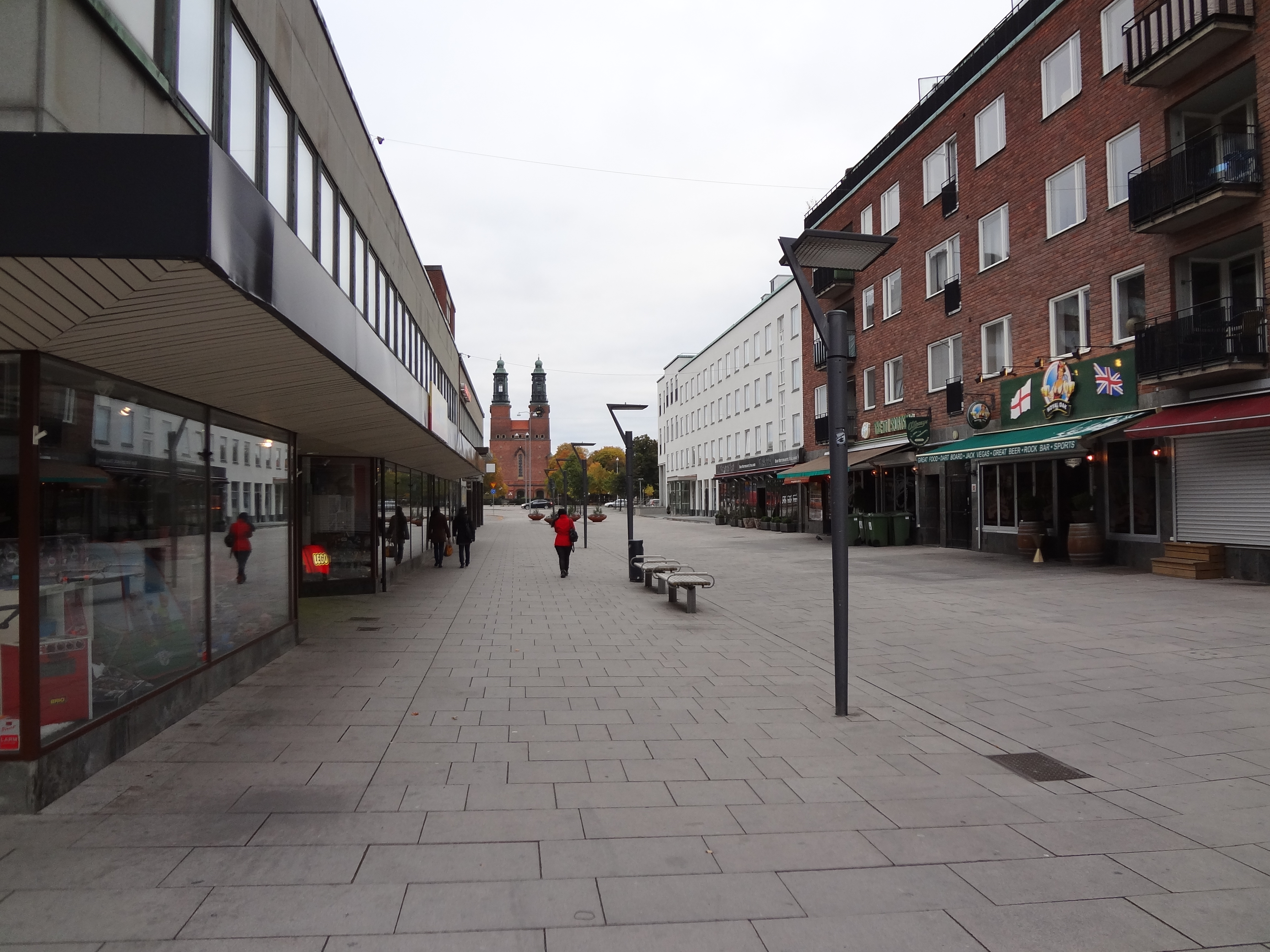 Nybrogatan i Eskilstuna, tittandes Norrut. Kloster kyrka syns i bakgrunden.